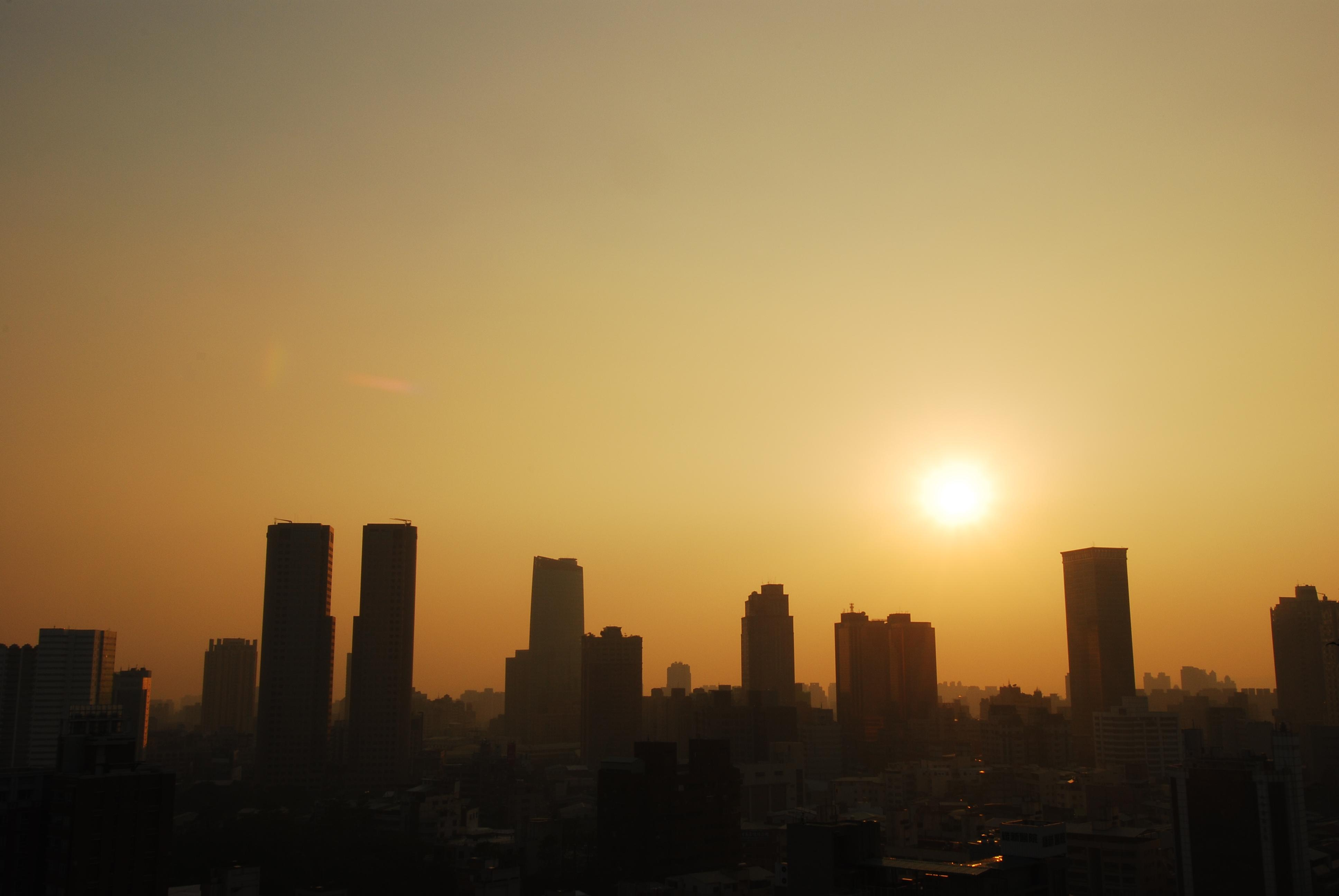 臺中市傍晚時分的天際線。 Bân-lâm-gú: Tâi-tiong-tshī pōng-buán sî-hun ê thian-tsè-suànn.